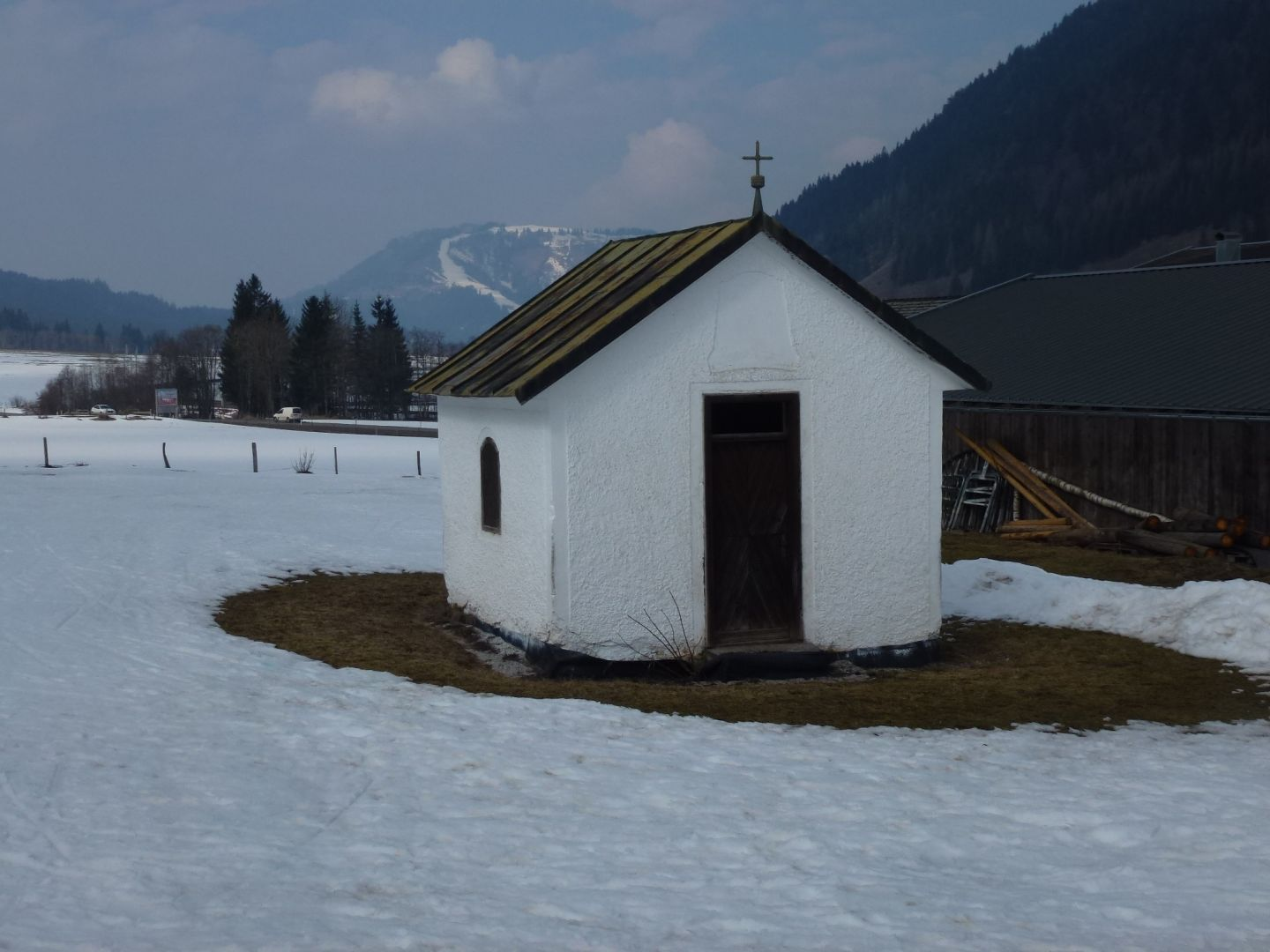 Kapelle am Greißenpass